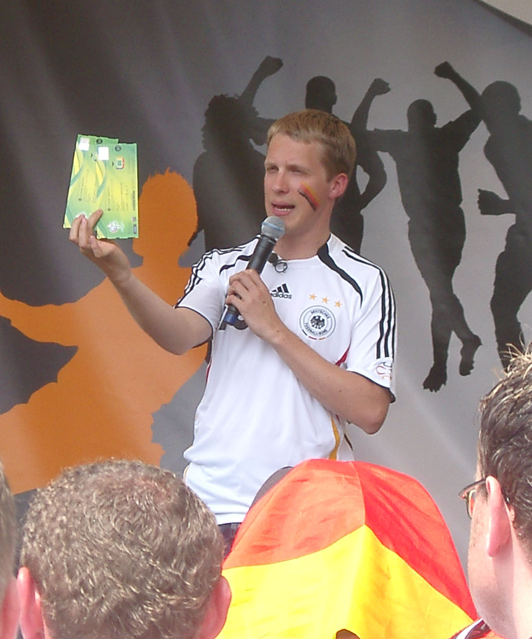 Oliver Pocher verlost zwei Eintrittskarten für ein WM-Spiel in Berlin